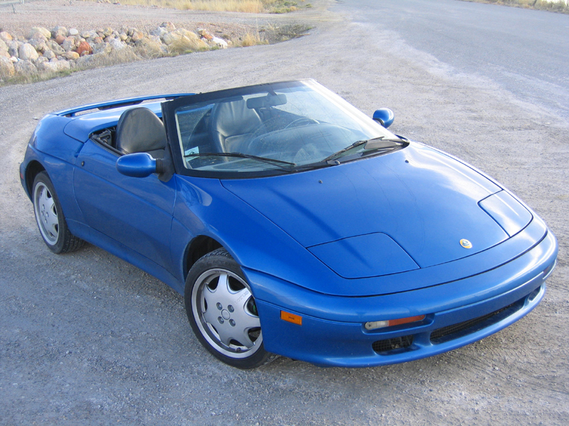 Lotus Elan M100, 1991, Federal (USA) Version